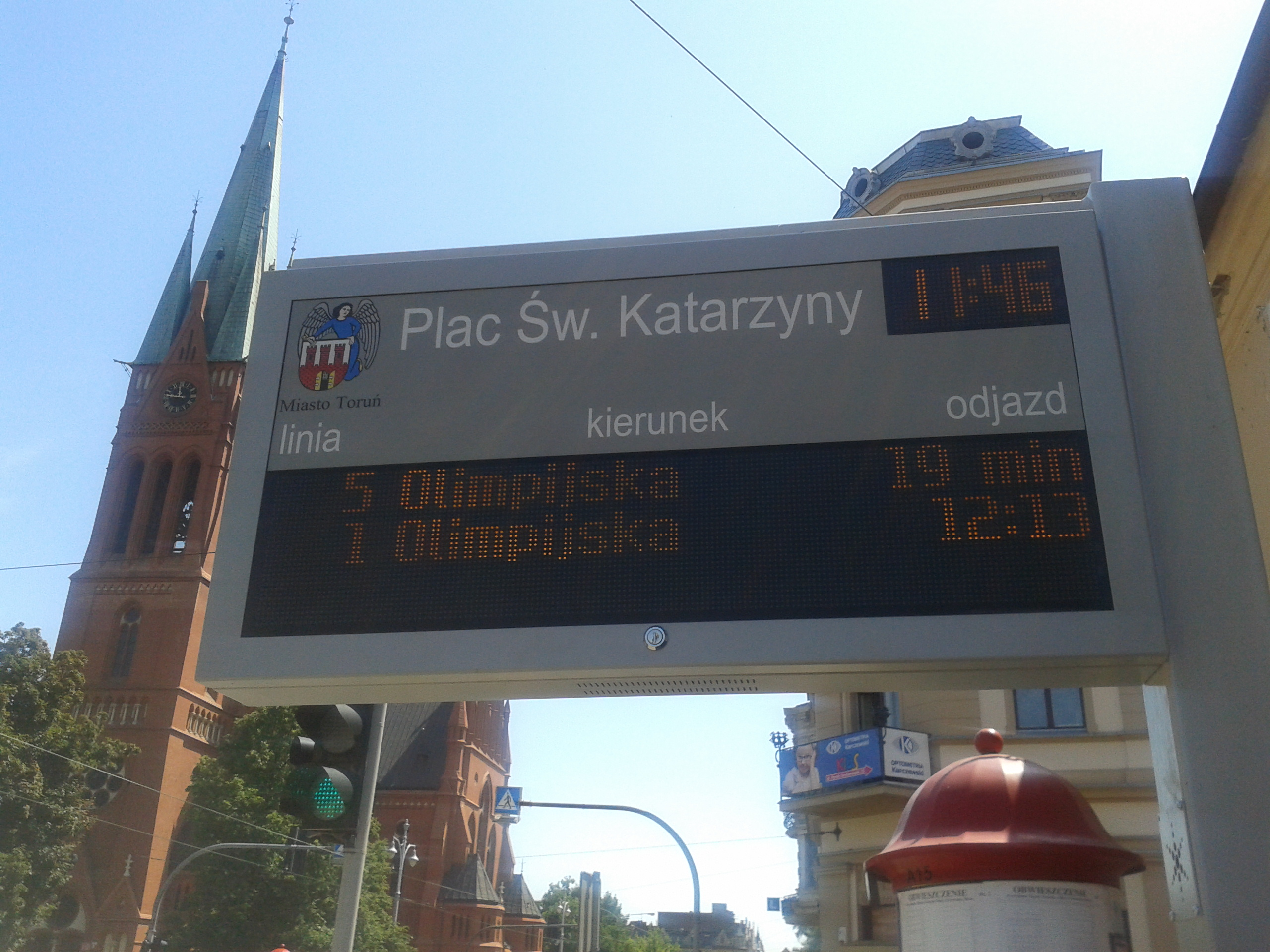 Tablica Systemu Informacji Pasażerskiej na placu św. Katarzyny w Toruniu